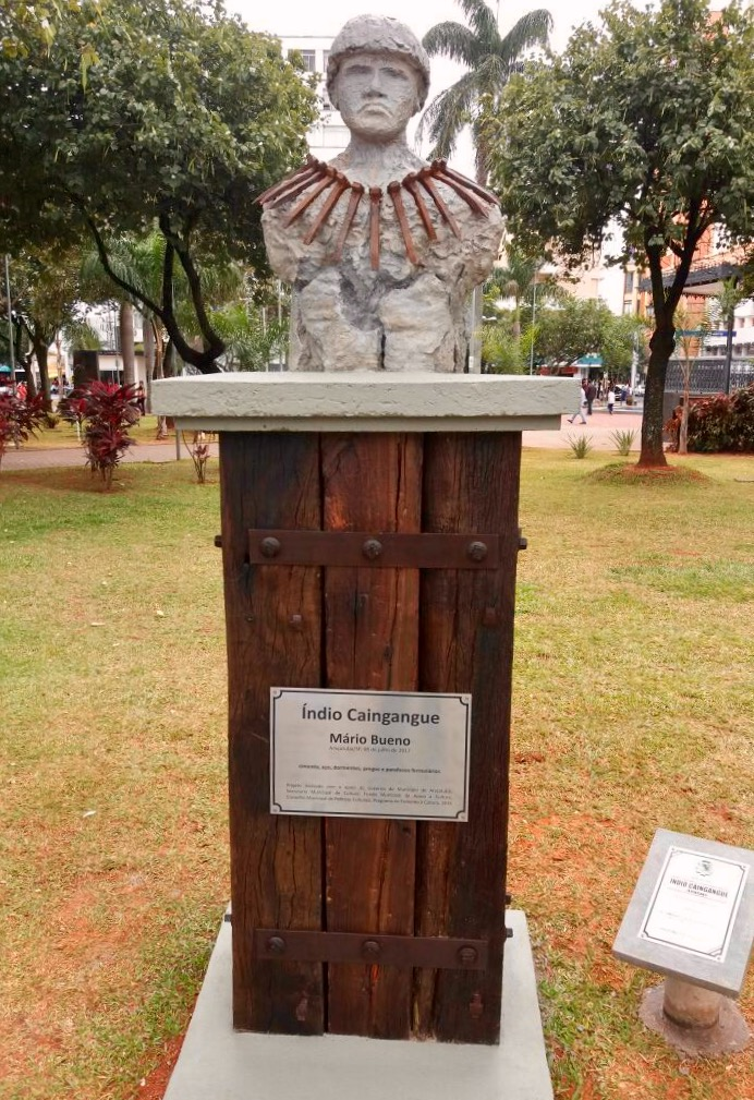 Feita de cimento, ferro, pregos e dormentes ferroviários. Autor: Mário Silveira Bueno